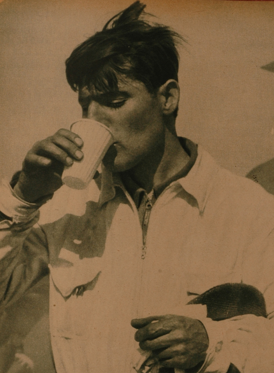 El Grafico del 18 de Marzo de 1938. Edicion 975